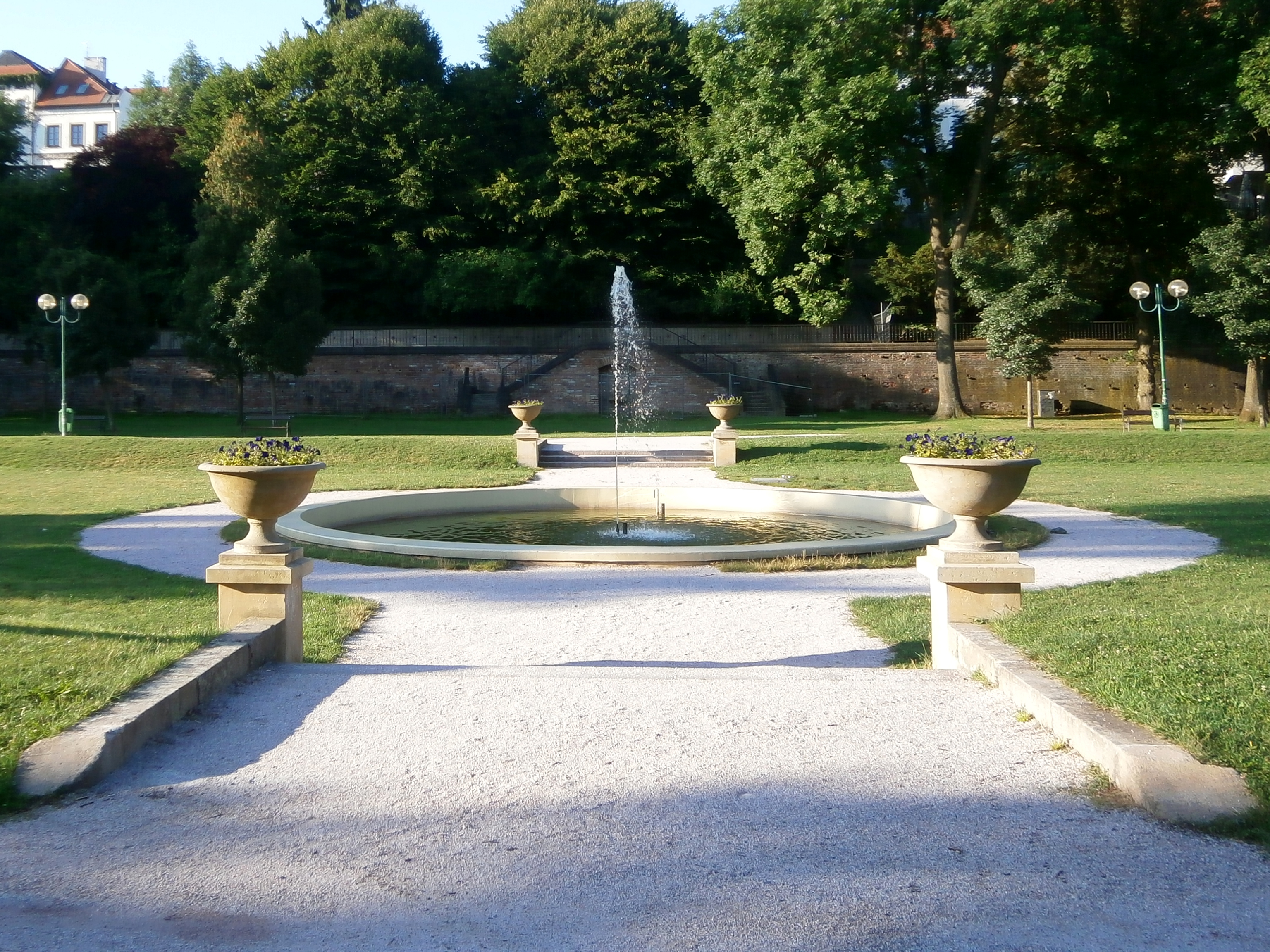 Žižkovy sady (Hradec Králové)